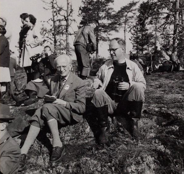 6712. E Stresemann at Vesterkulla, June 8, 1958